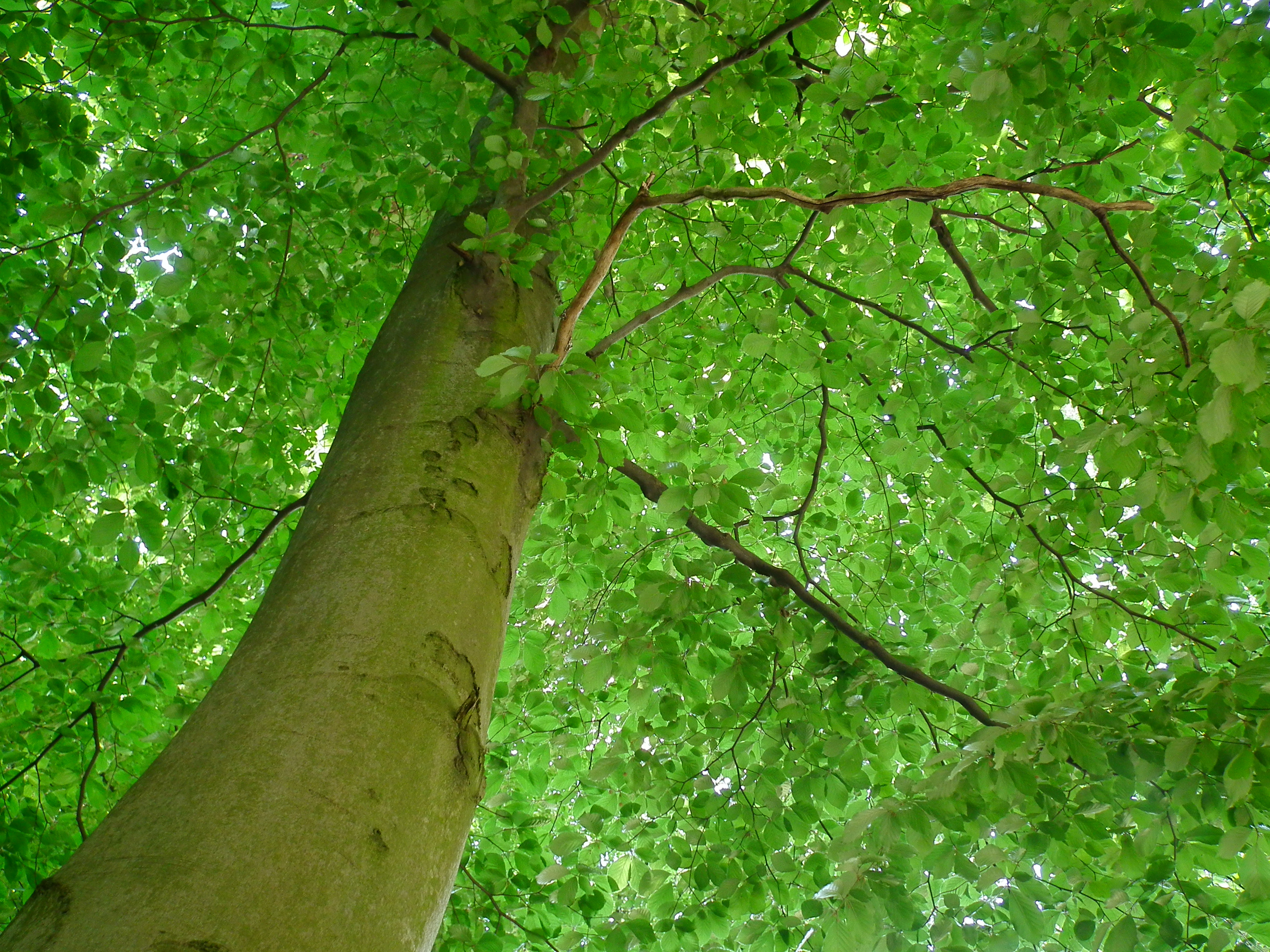 Stamm und Blätterdach einer Buche (Fagus sylvatica), fotografiert in Erlenbach (Hessen, Deutschland)